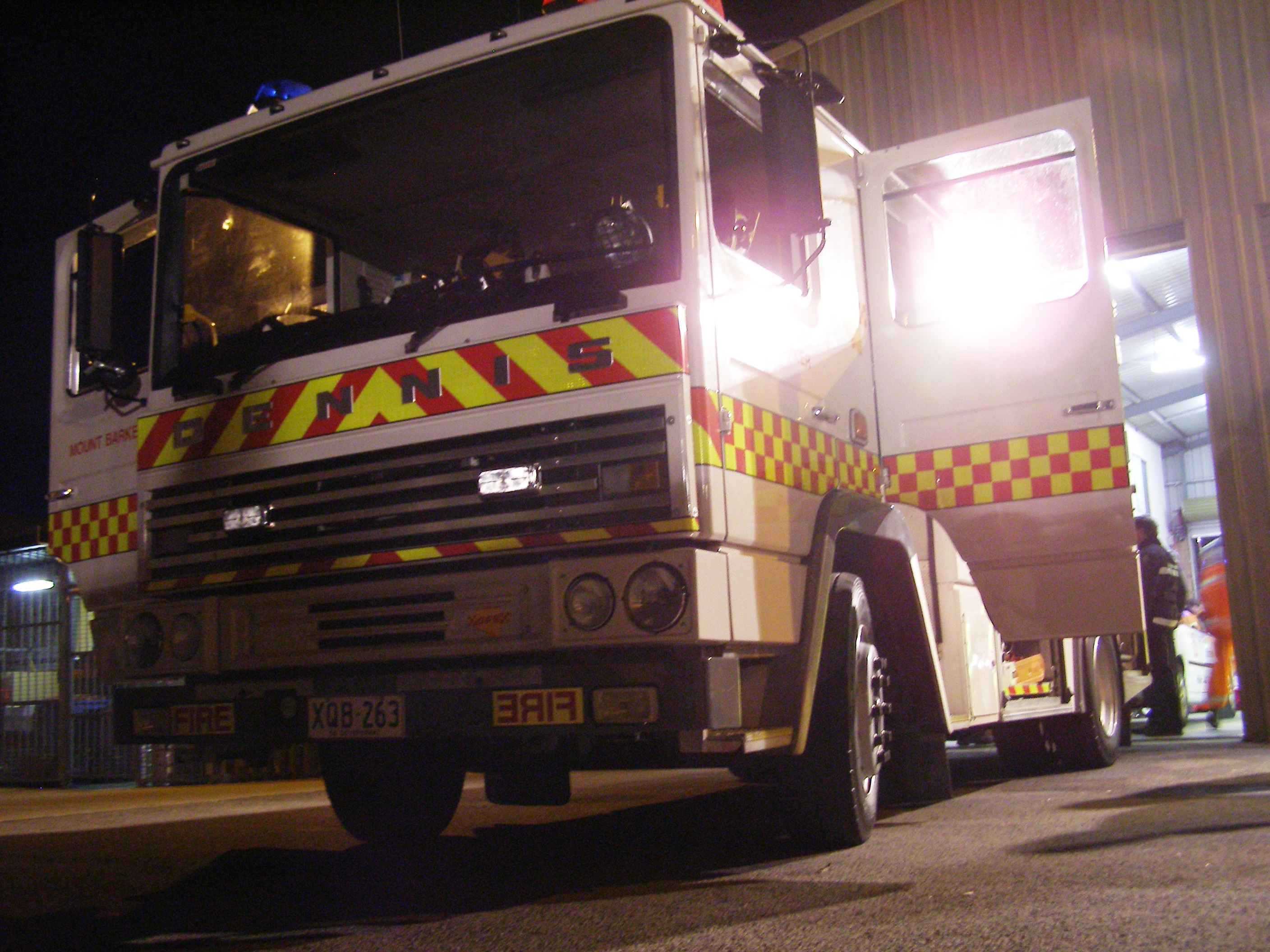 taken by user:Emmanuellives